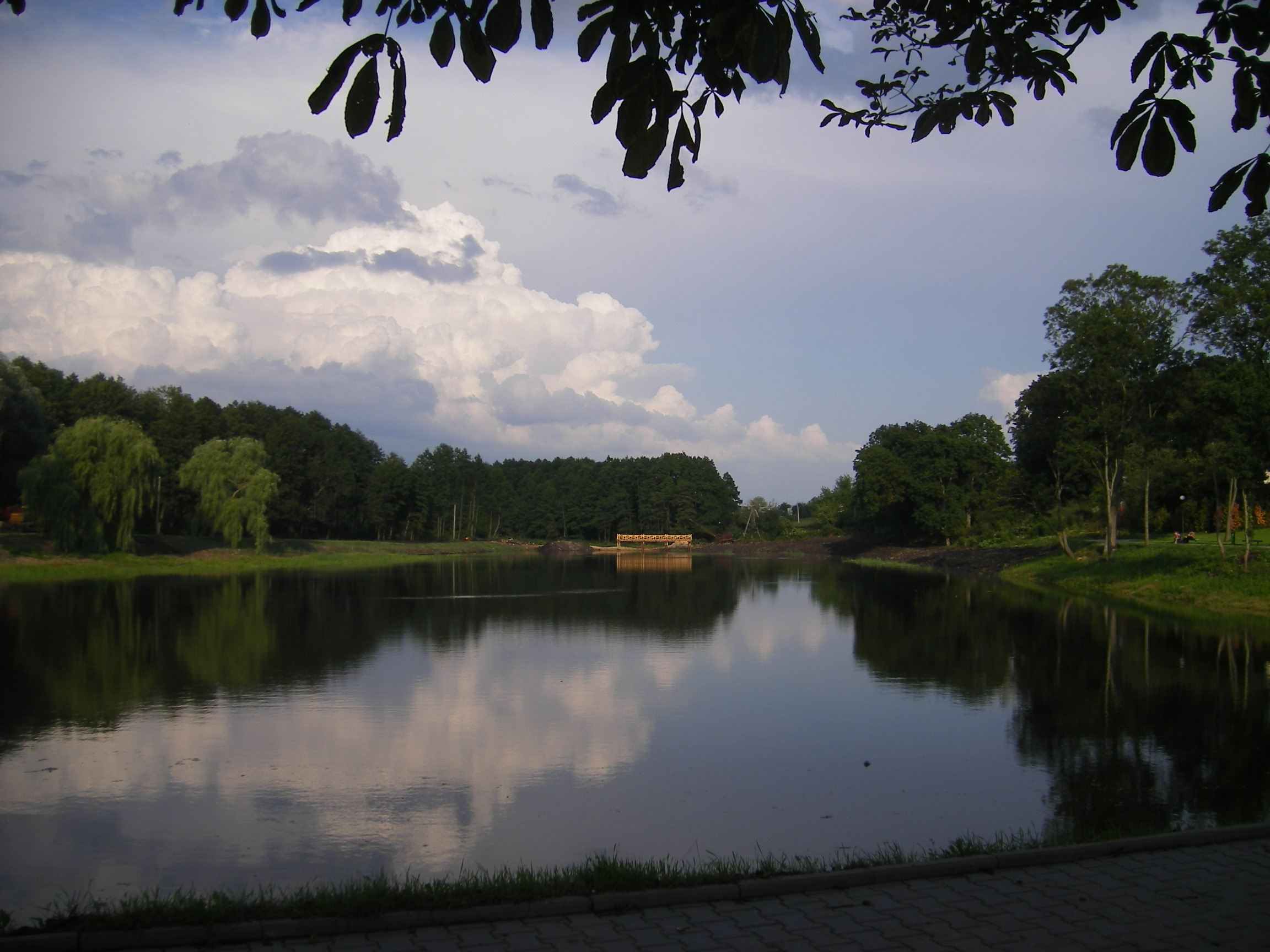 Vyalikaya Berastavitsa, lake in centre